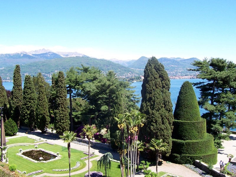 Scorcio dei giardini dell'Isola Bella